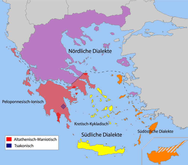 Dialekte in Griechenland und Zypern/ Modern Greek dialects map, de-version